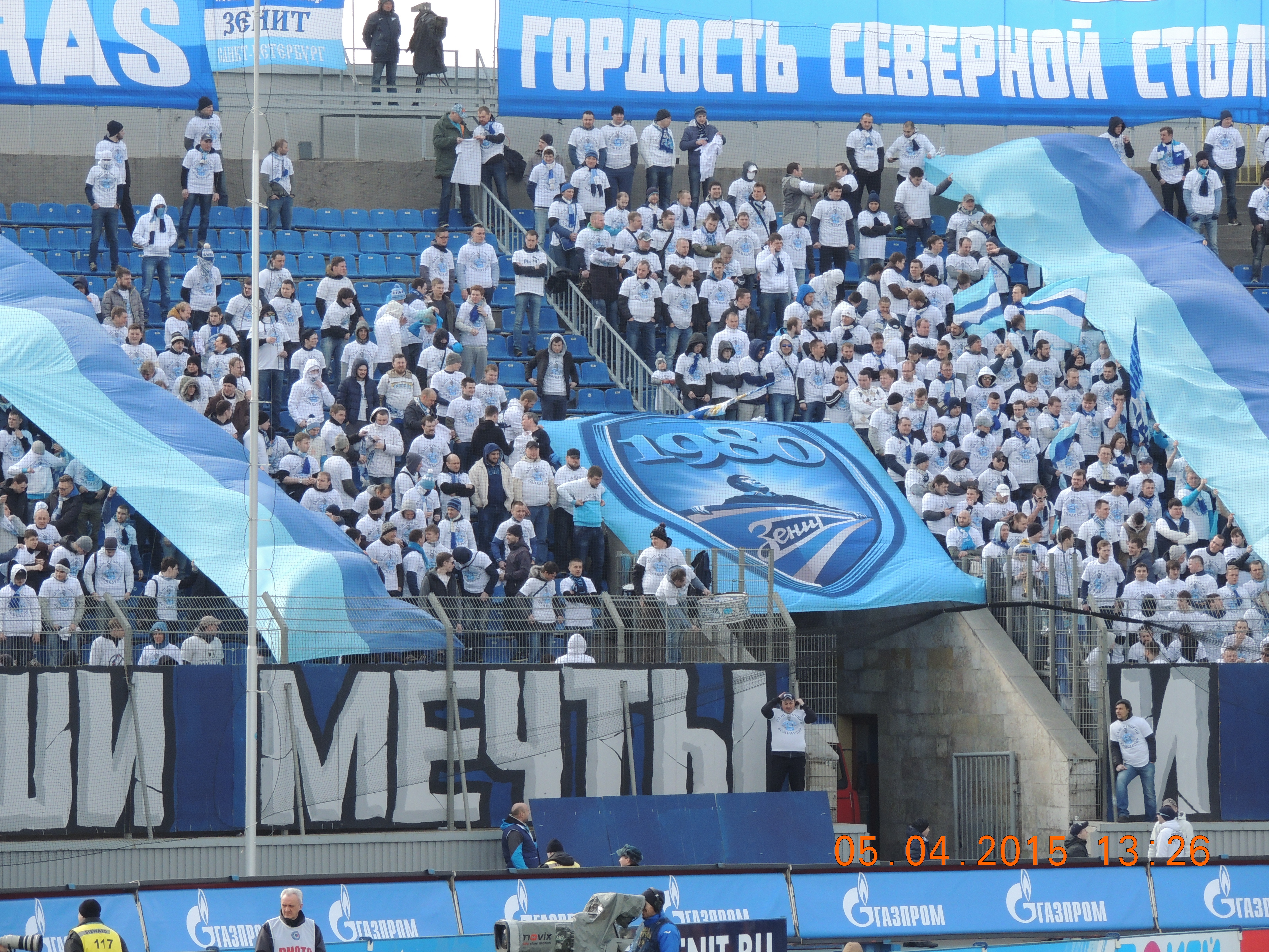 zenit stadion